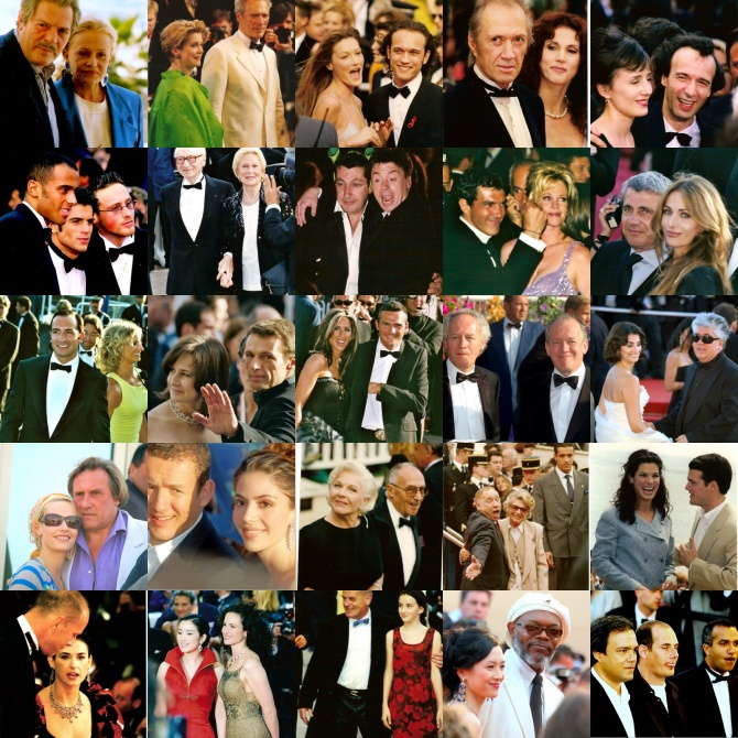 Montage de photos personnelles du festival de Cannes (prises dans les années 1990 et 2000)